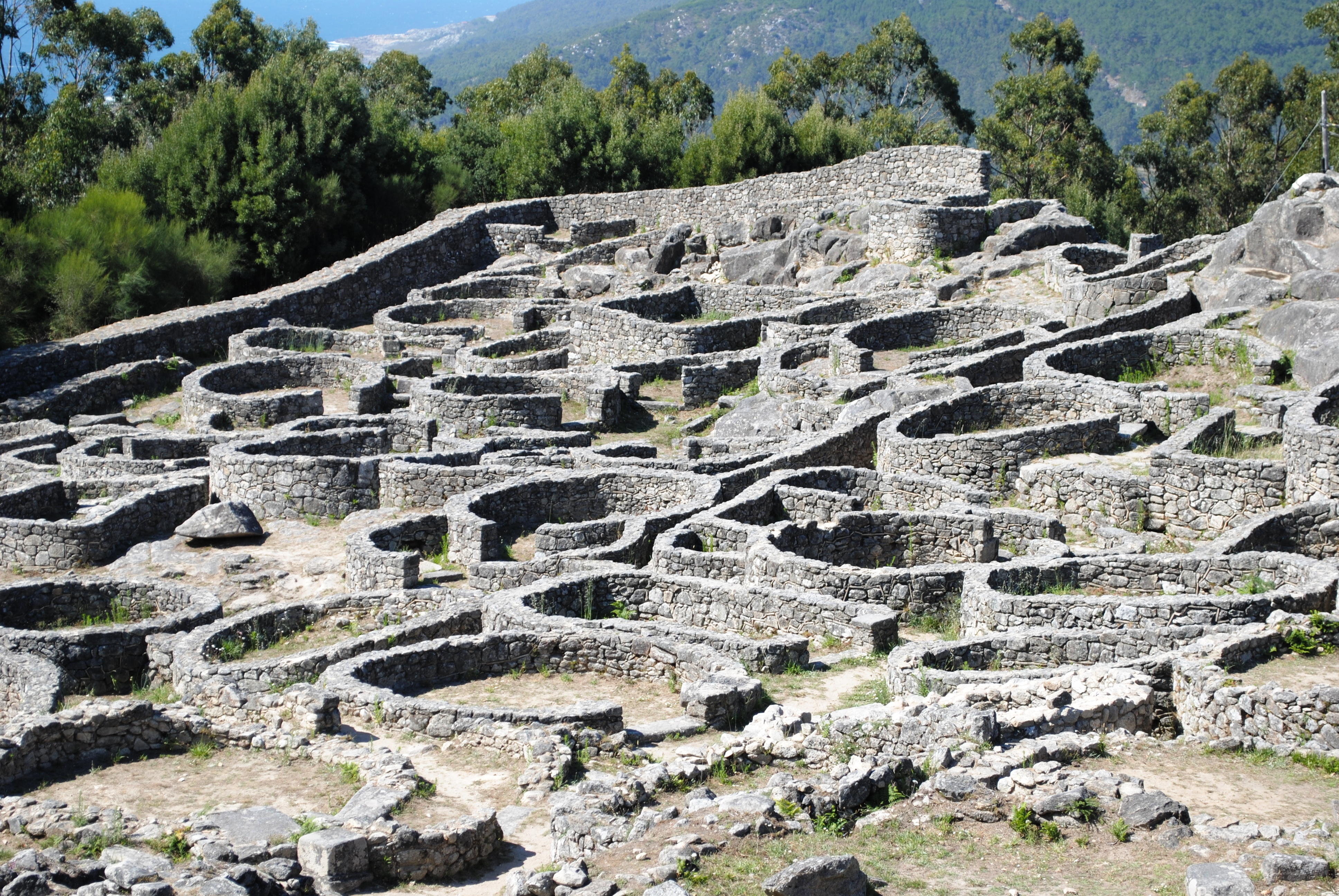 Castro de Santa Trega, 2011.